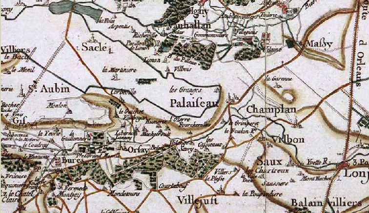 Carte de Palaiseau selon Cassini